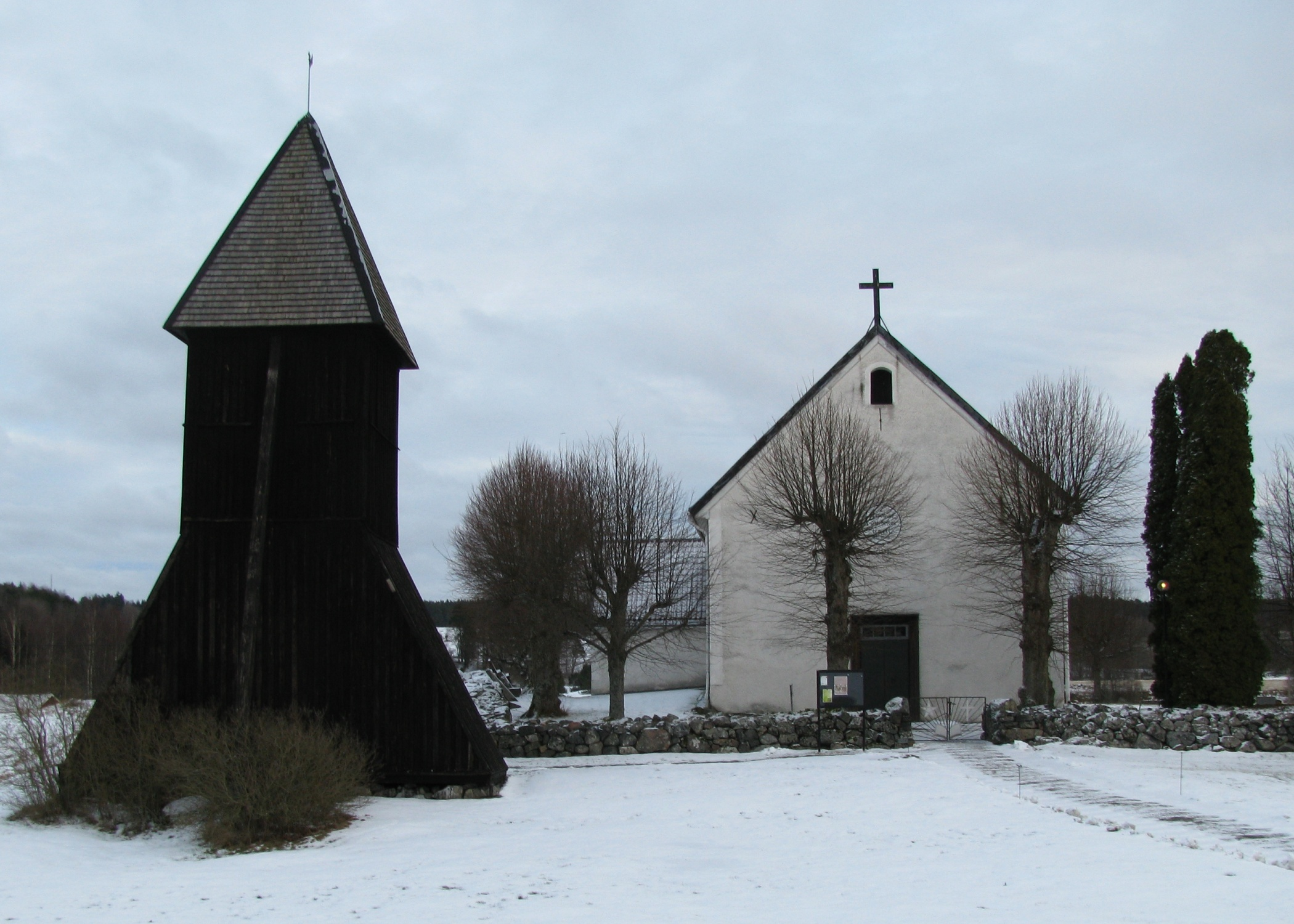 Vada kyrka i Vallentuna kommun. Källa: eget foto, fotograf EnDumEn 11 februari 2009